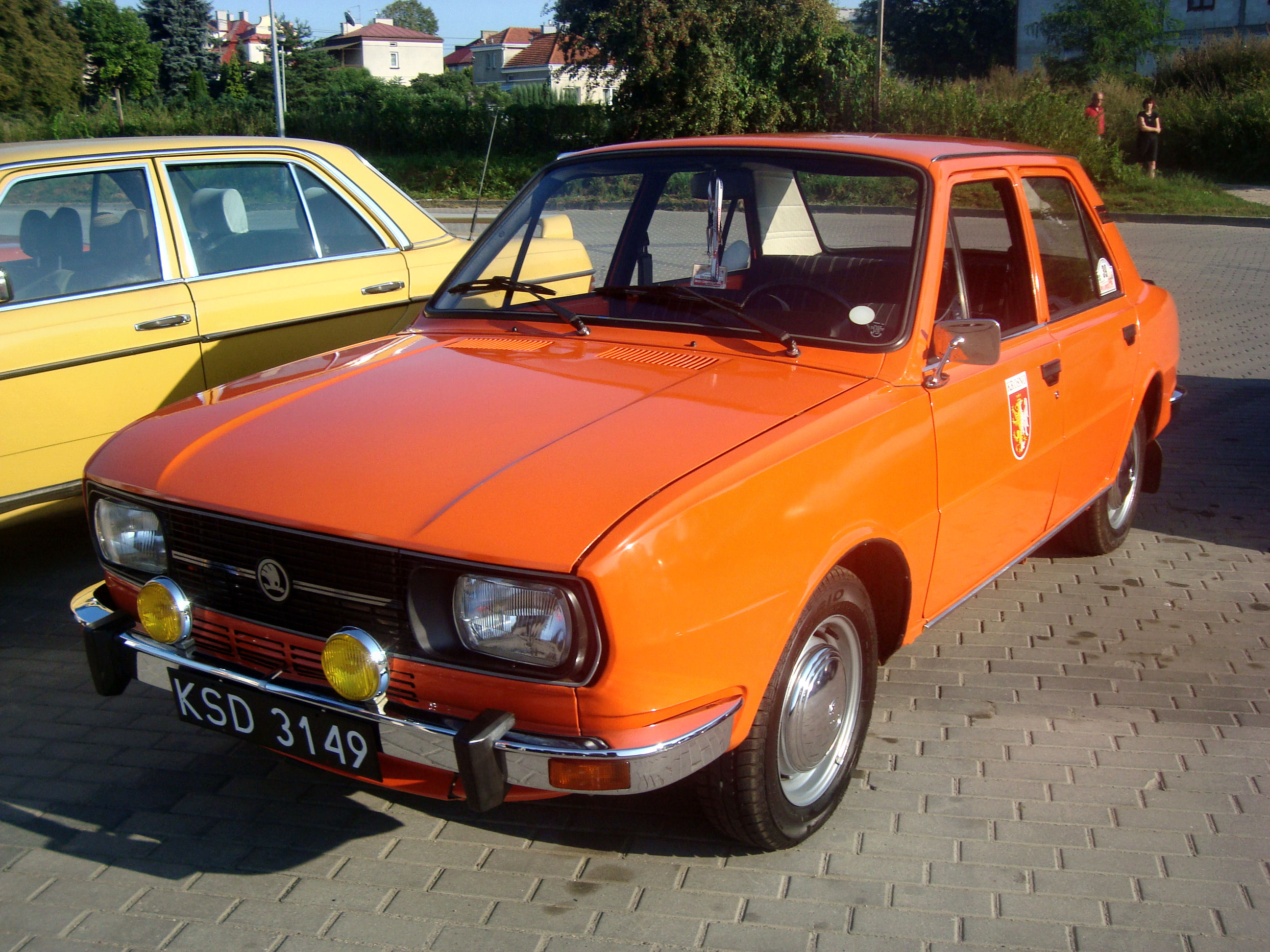 Skoda 105L z 1982 roku w Jaśle